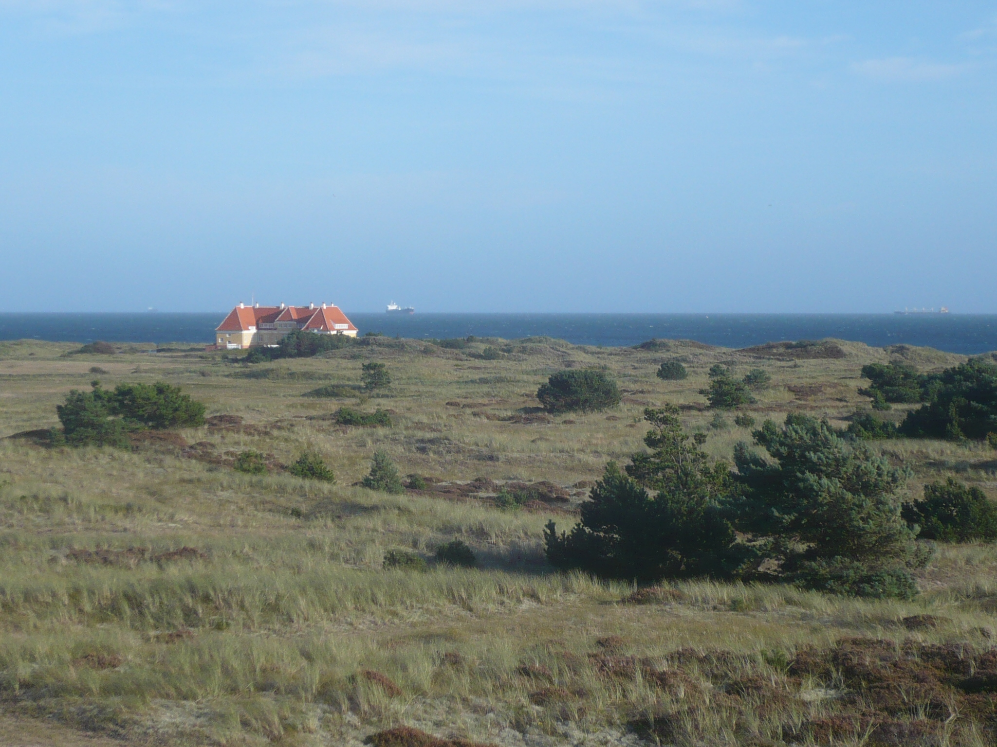 Klitgården just south of Skagen, Denmark